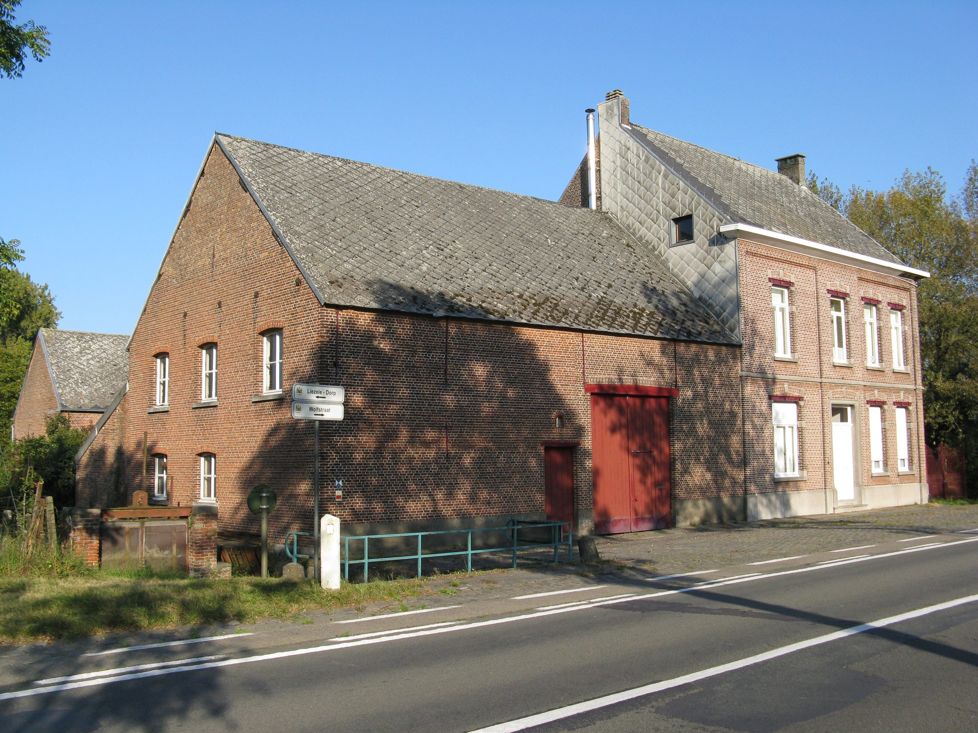 Schemelbertmolen, Liezele, Puurs, Antwerpen, BelgiëUnknown